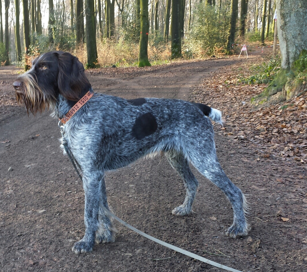 D-Wurf vom Hardenberg